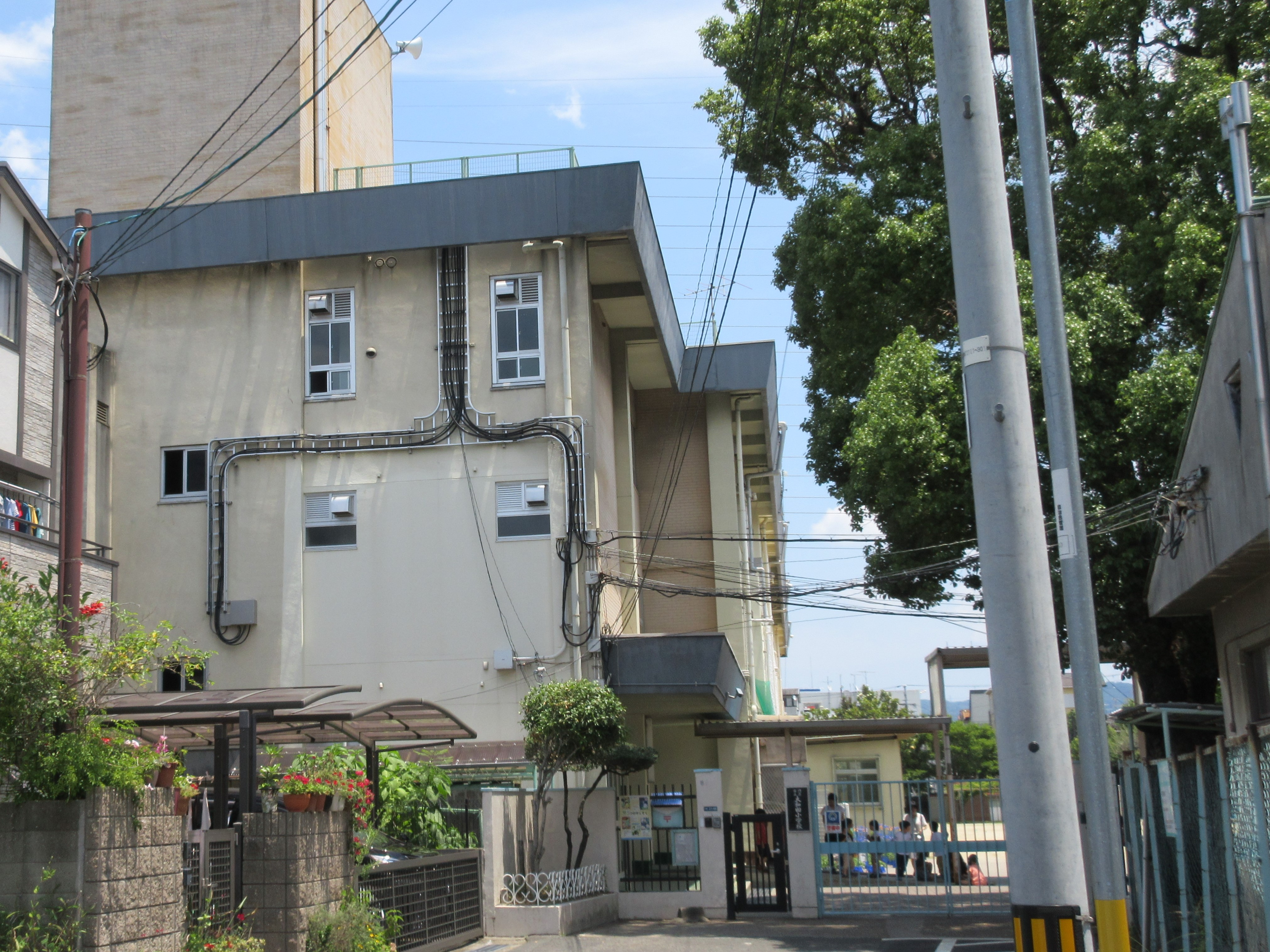 門真市立大和田小学校